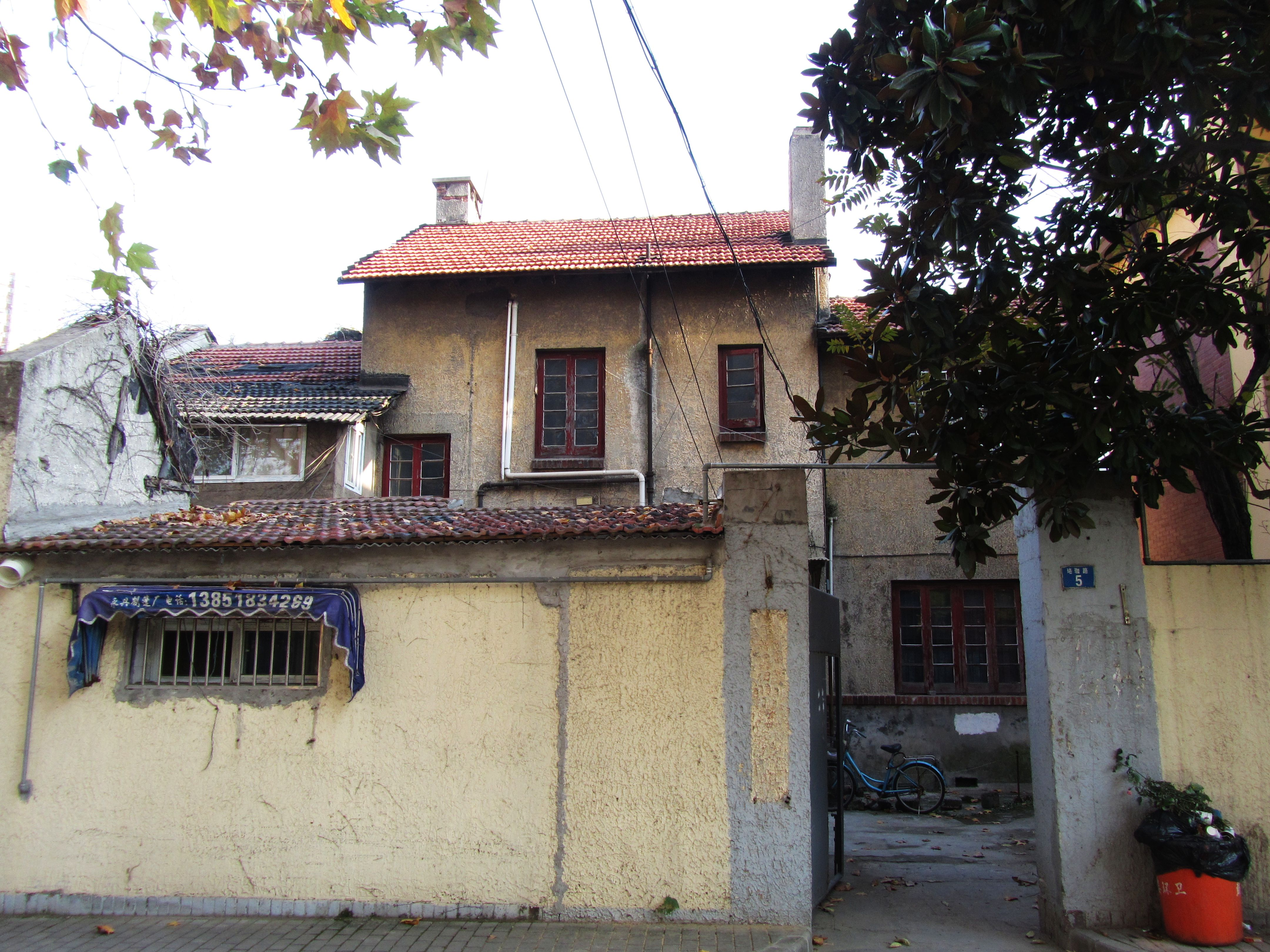 颐和路公馆区——珞珈路5号民国建筑（汤恩伯公馆旧址）。